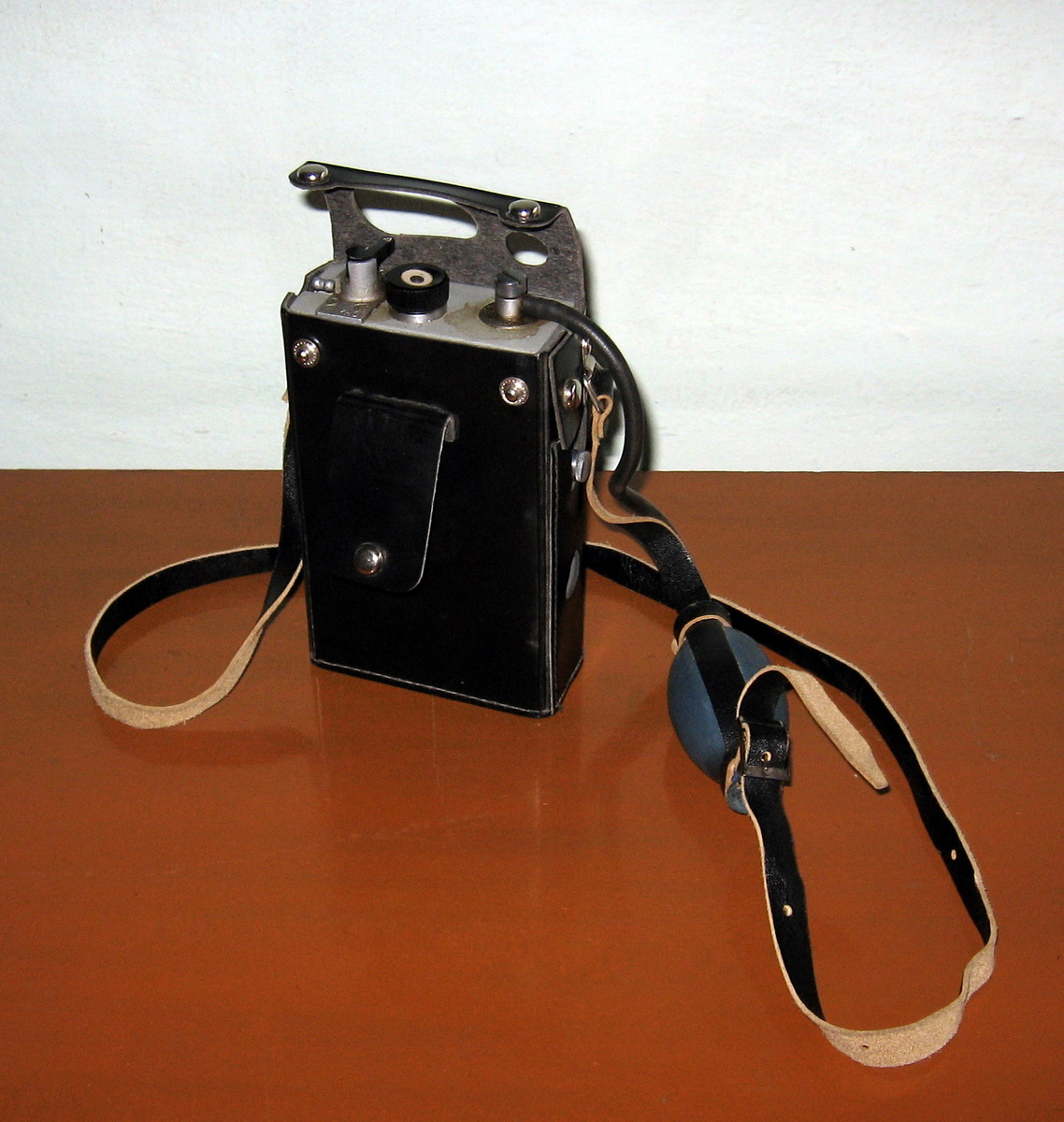 Mine interferometer ШИ-11 – Шахтний інтерферометр ШИ-11